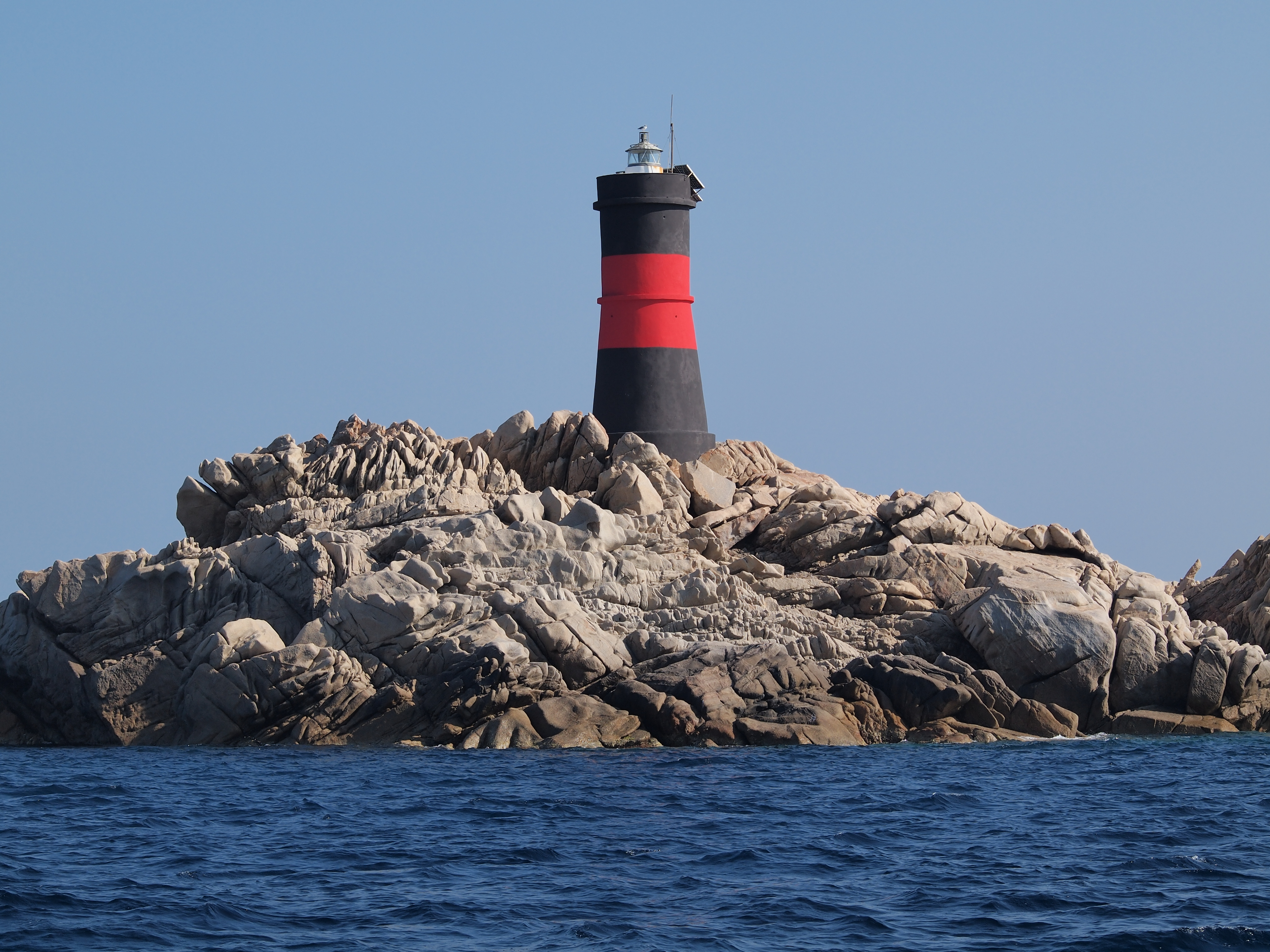 Leuchtturm auf der Insel Barrettinelli, nördlich der Insel Corcelli, Maddalena Archipel, Nord-Sardinien (41.301612N; 9.400877E)